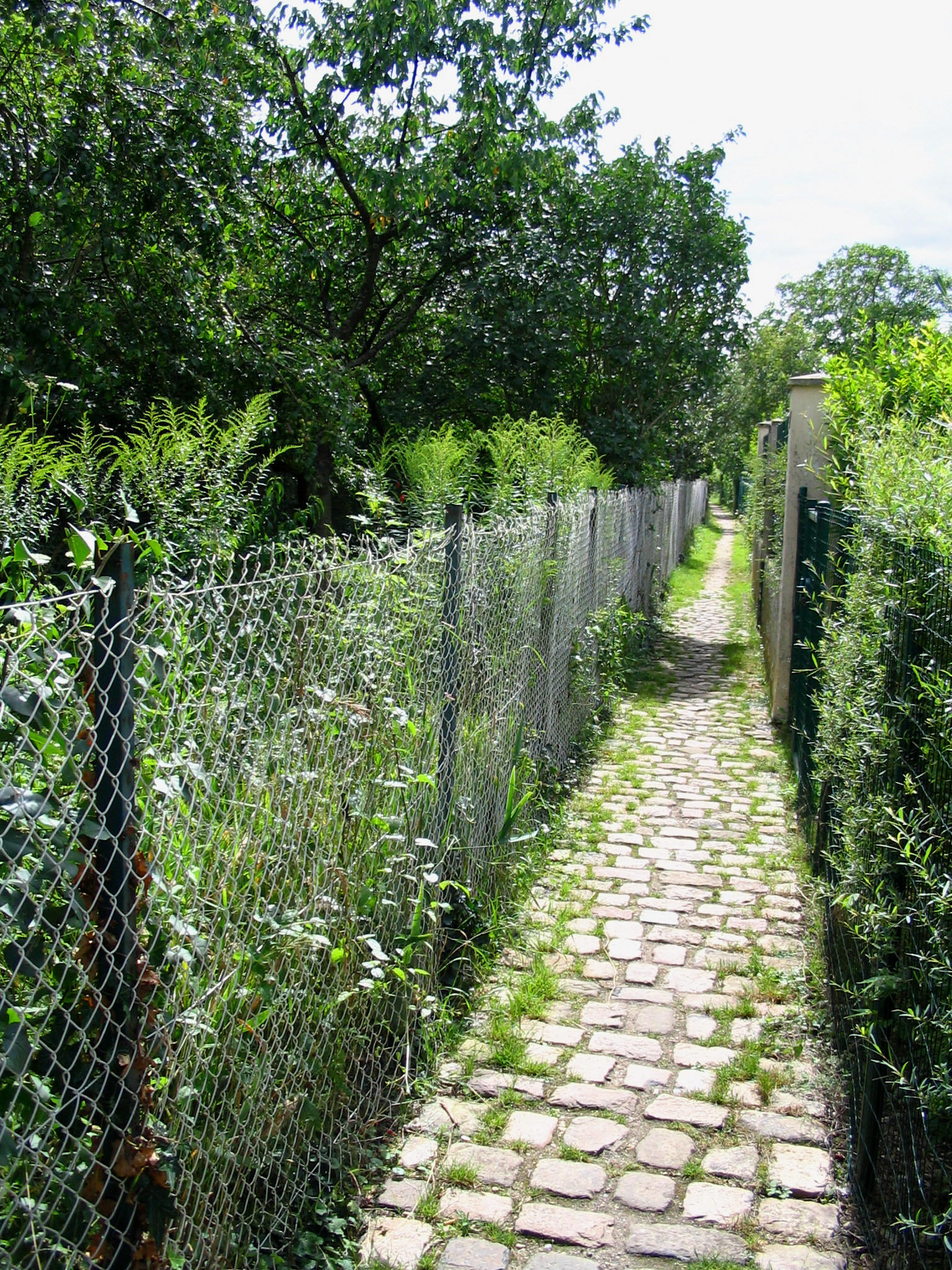 Jardins bateliers de Saint-Mammes - Seine et Marne - France